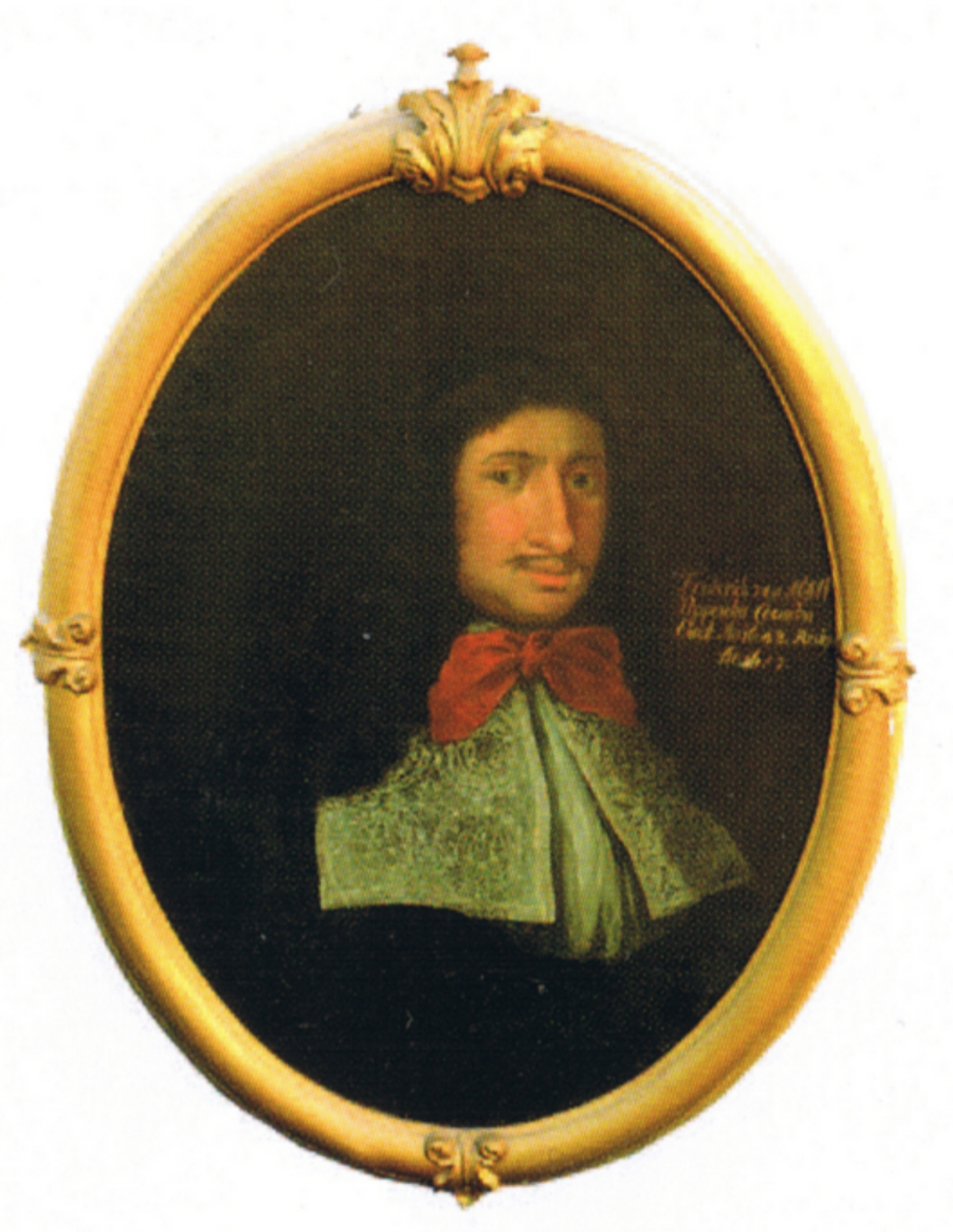 Friedrich von Ahlefeldt (1618-1665), Herr auf Seestermühe und Hochfürstlicher Gottorffischen Stadthalter, Klosterprobst von Uetersen